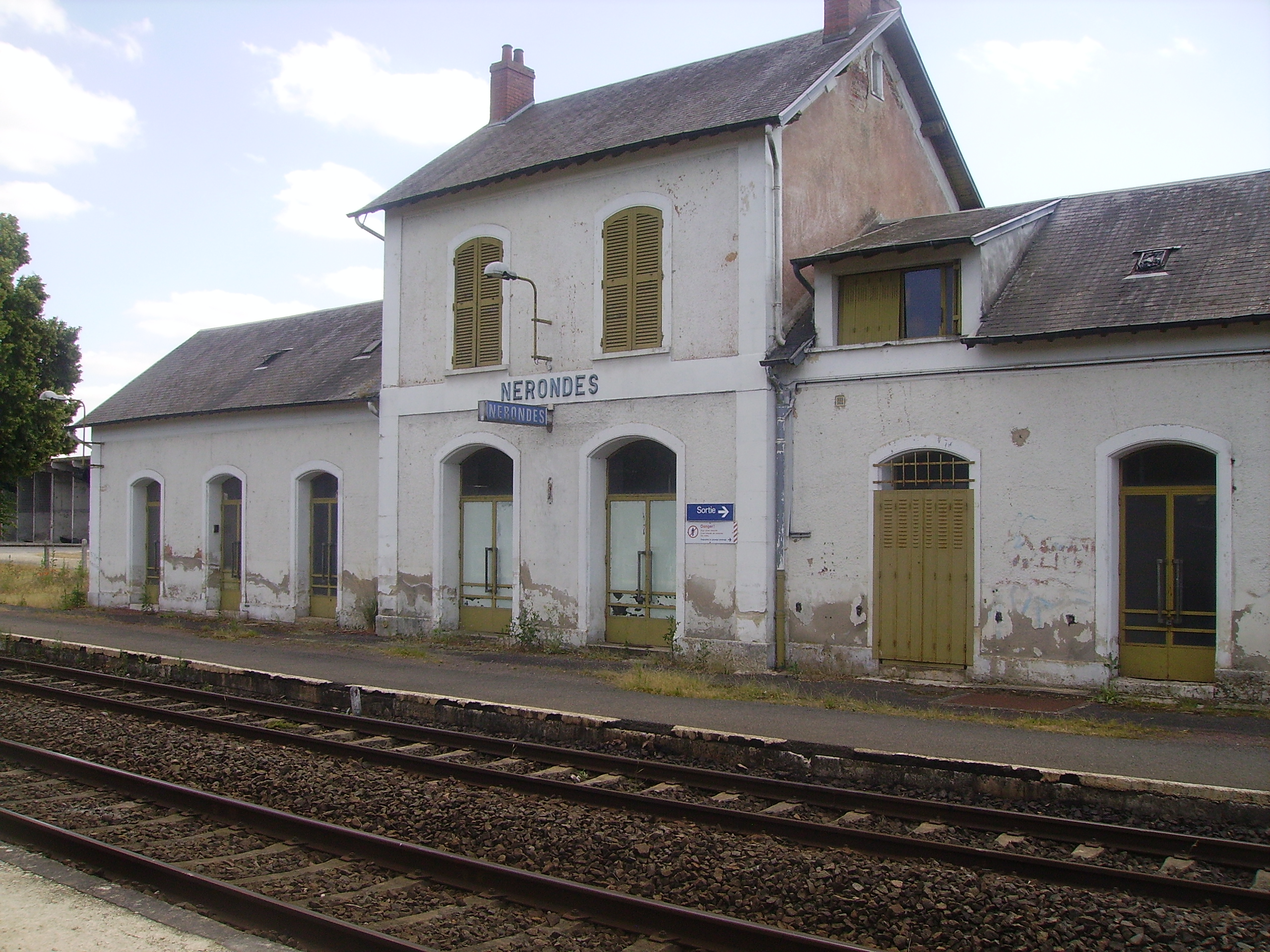 Gare de Nérondes (Cher)